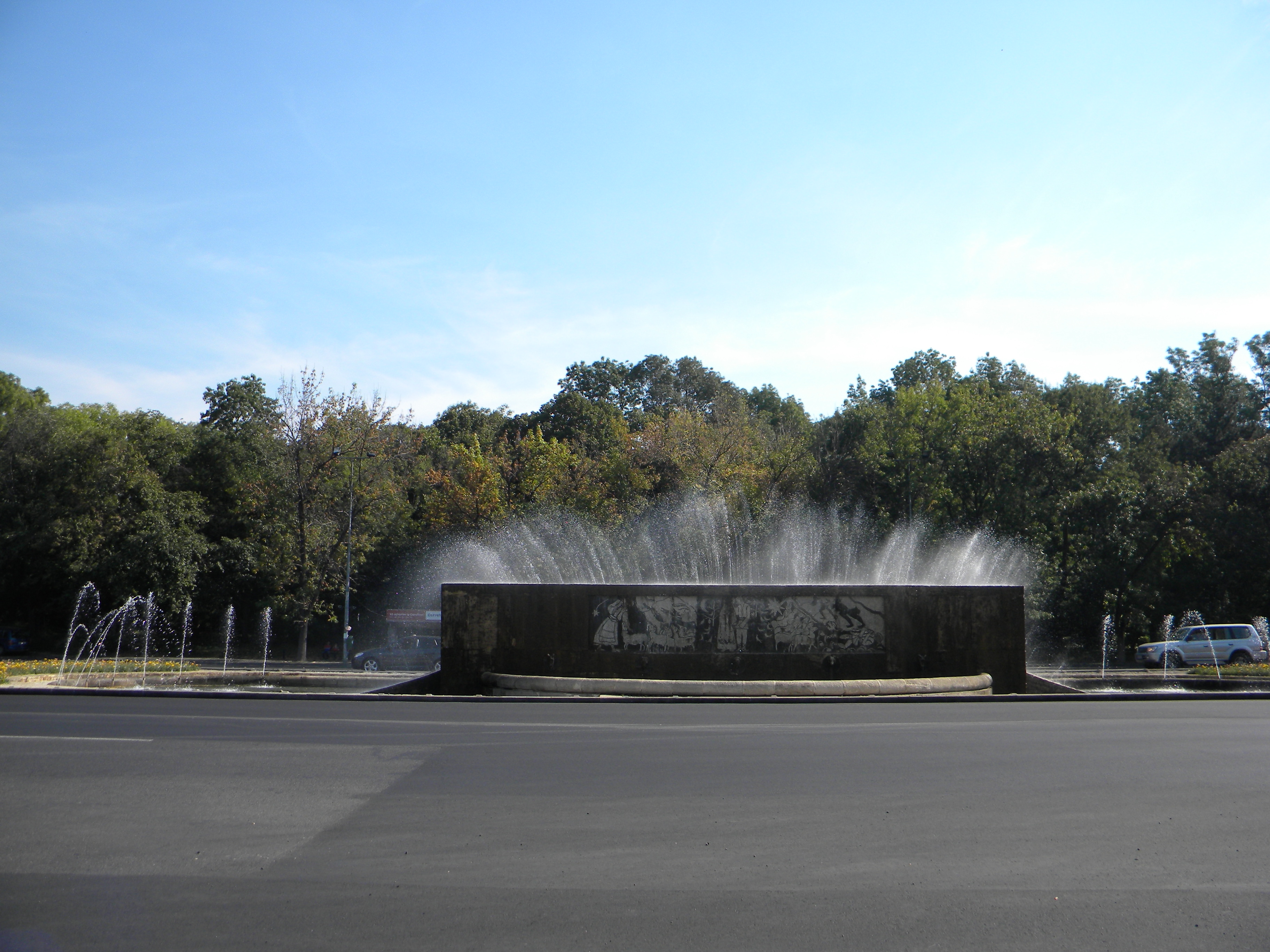 Fantana Miorita, Bucuresti (1)